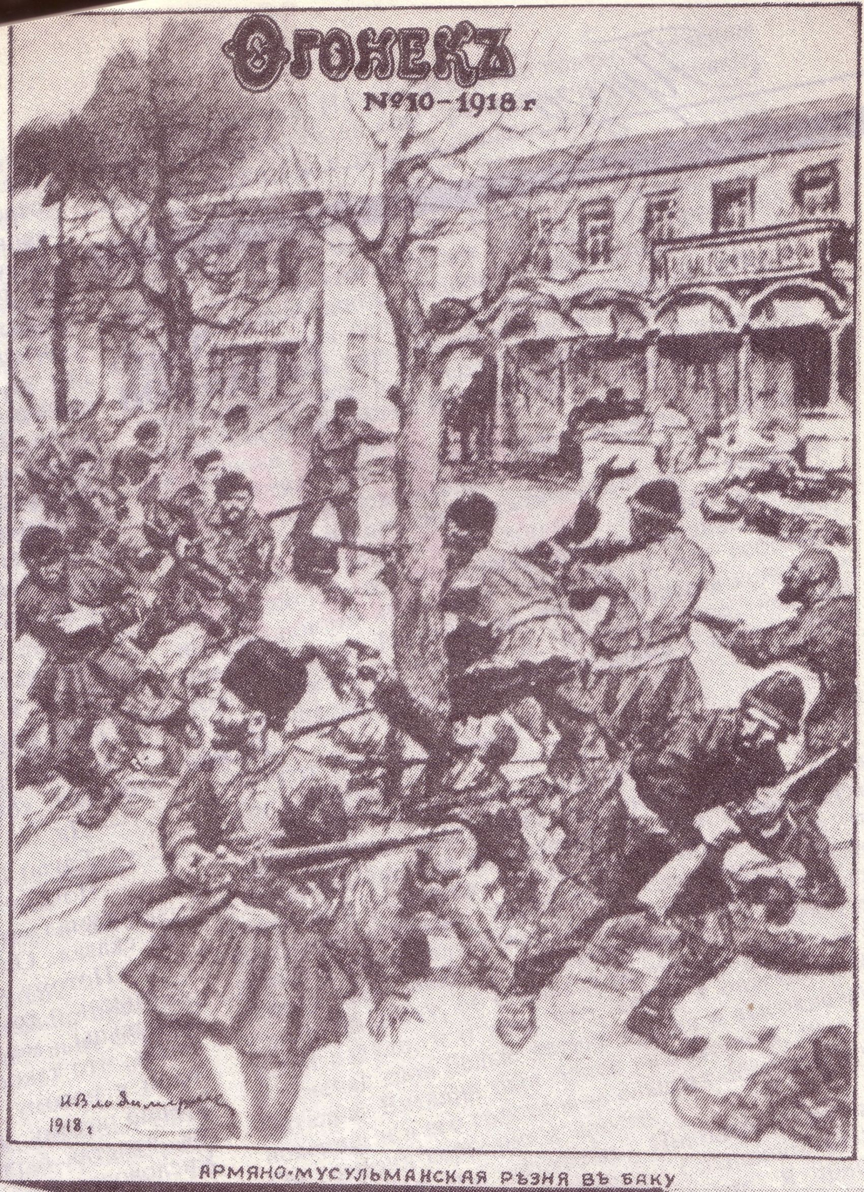 «Армяно-мусульманская резня в Баку». Обложка русского еженедельного журнала «Огонёк» № 10 (март) 1918 года.